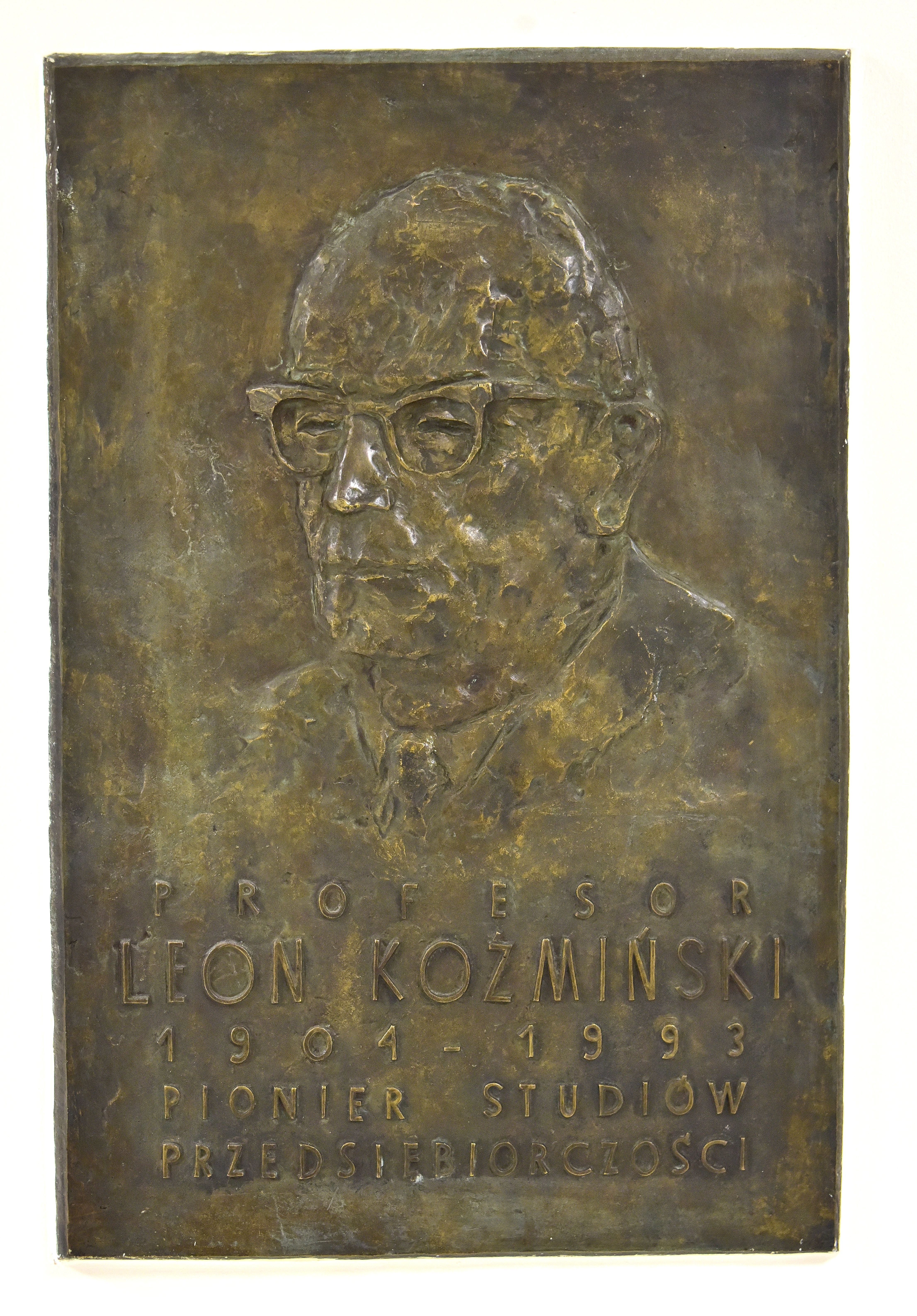 Tablica upamiętniająca Leona Koźmińskiego przy auli jego imienia w Akademii Leona Koźmińskiego w Warszawie przy ul. Jagiellońskiej 57/59 w Warszawie